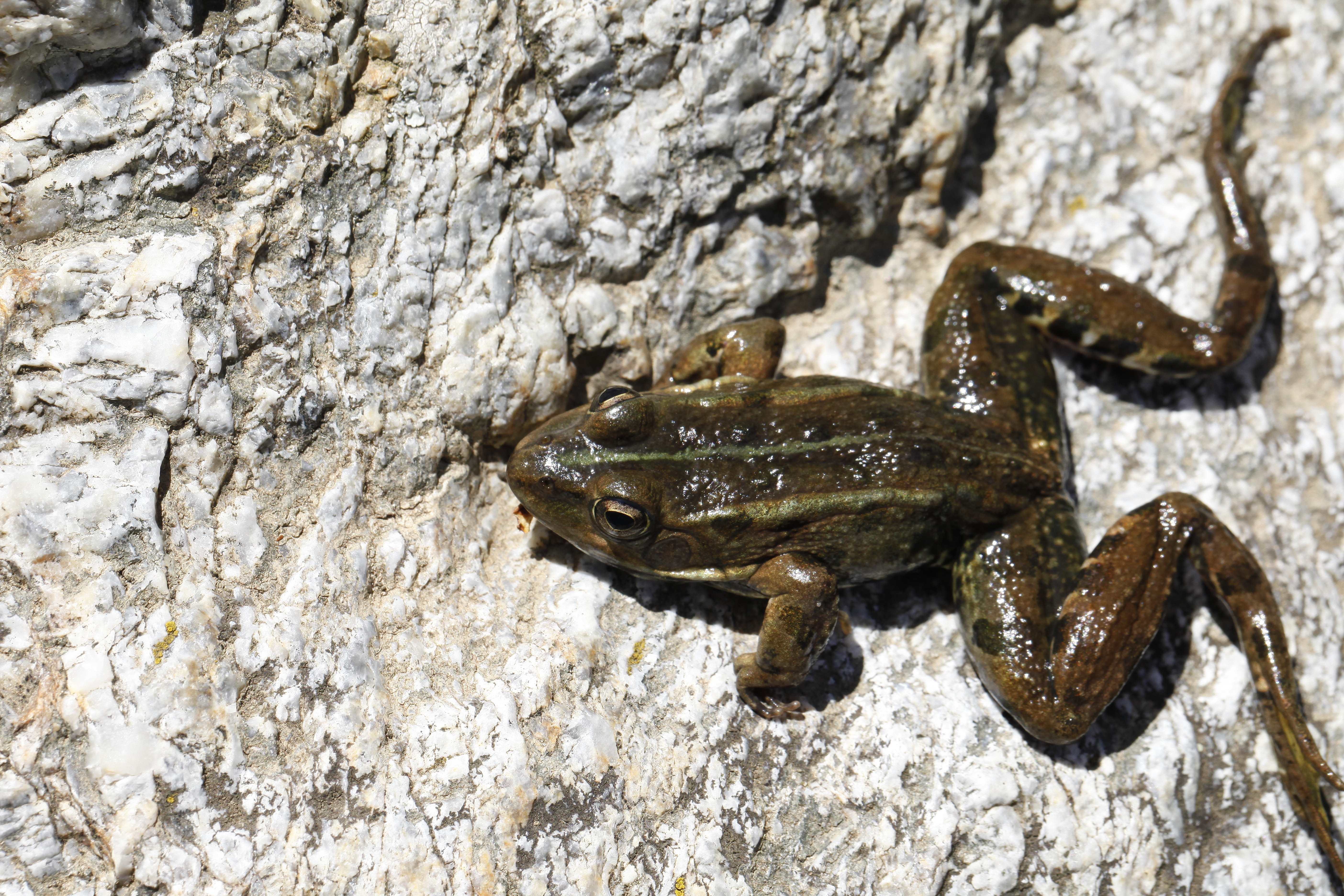 Grenouille de Perez dans la RNN de la Forêt de la Massane.